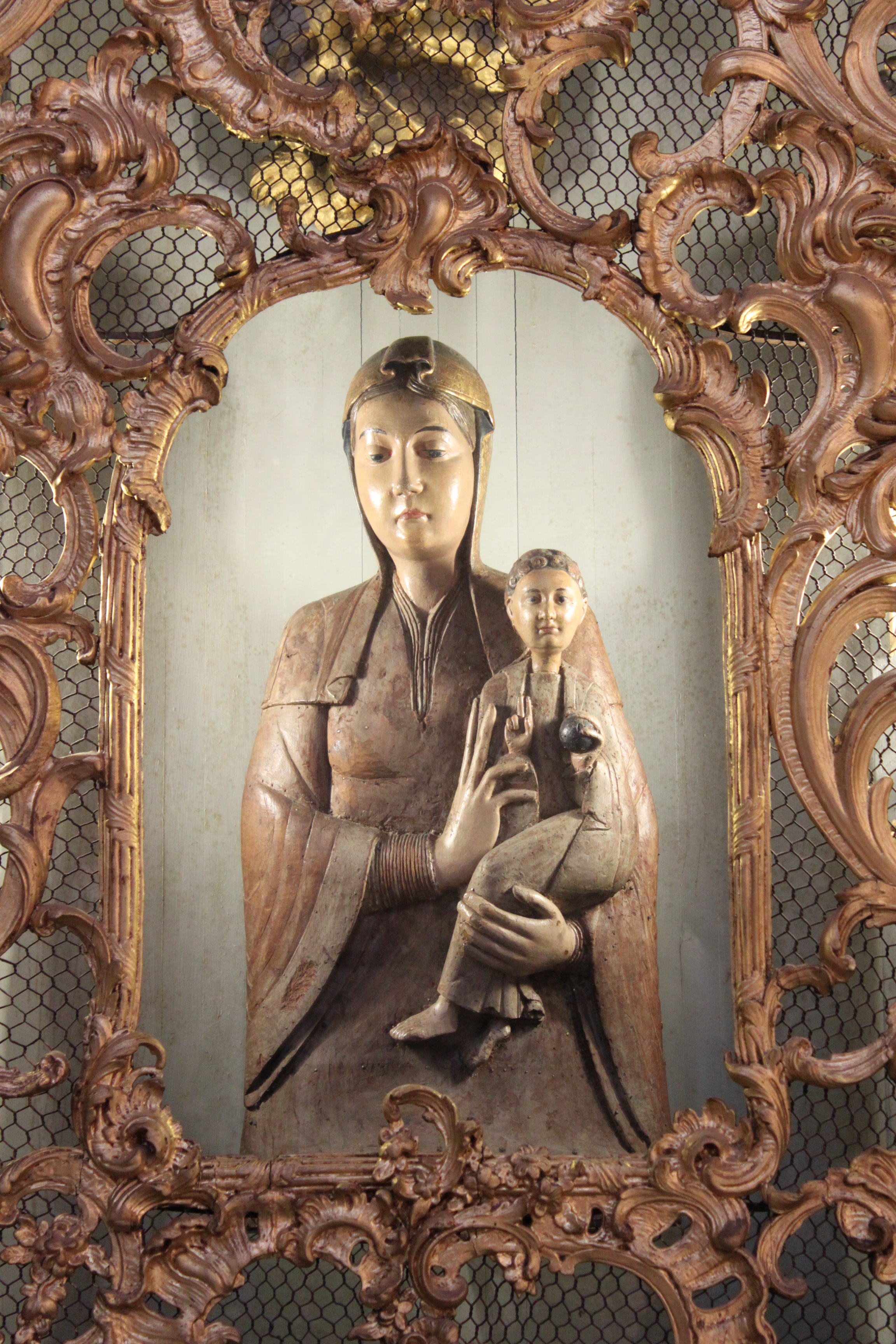 Remiremont, Vosges, Lorraine, France